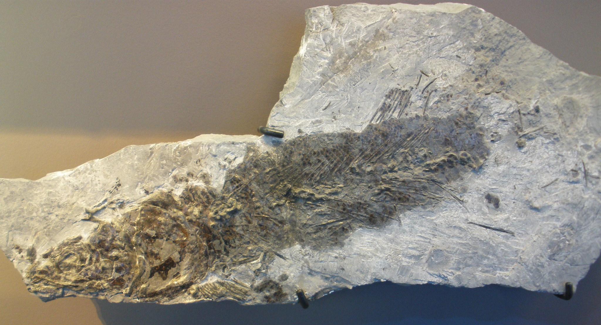 Fossil of Caturus, an extinct fish Took the photo at Musee d'Histoire Naturelle, Brussels